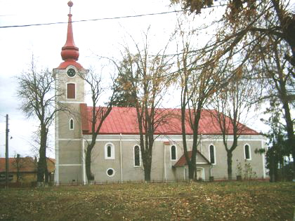 Hegyközcsatár református temploma, Erdély